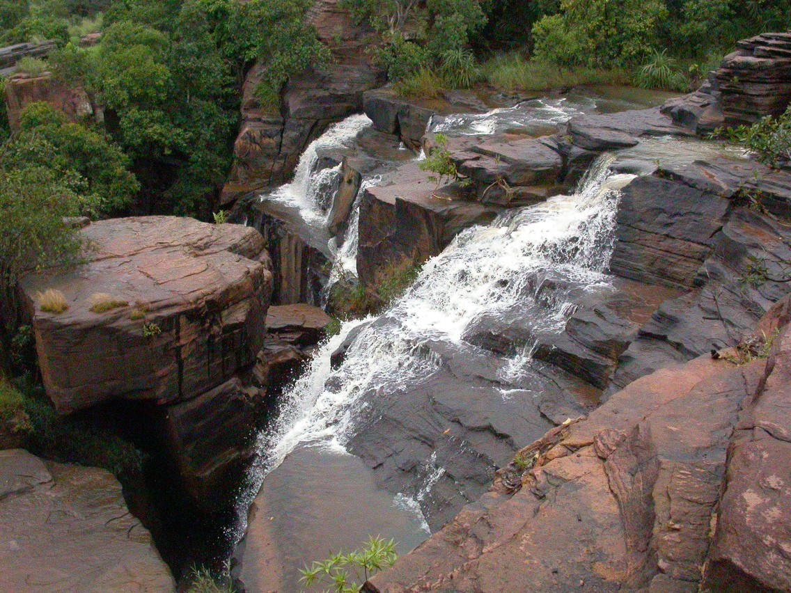 Cascades de Banfora, also called Cascades de Karfiguela, near Banfora in Burkina Faso